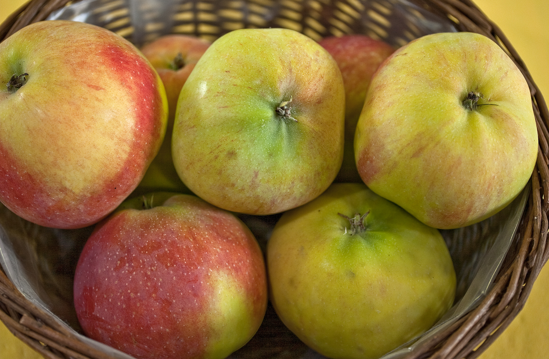 Der Jamba ist eine Apfelsorte